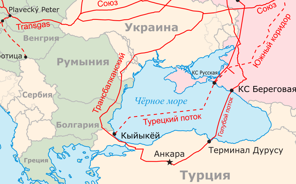 Török áramlat («Турецкий поток») 2018